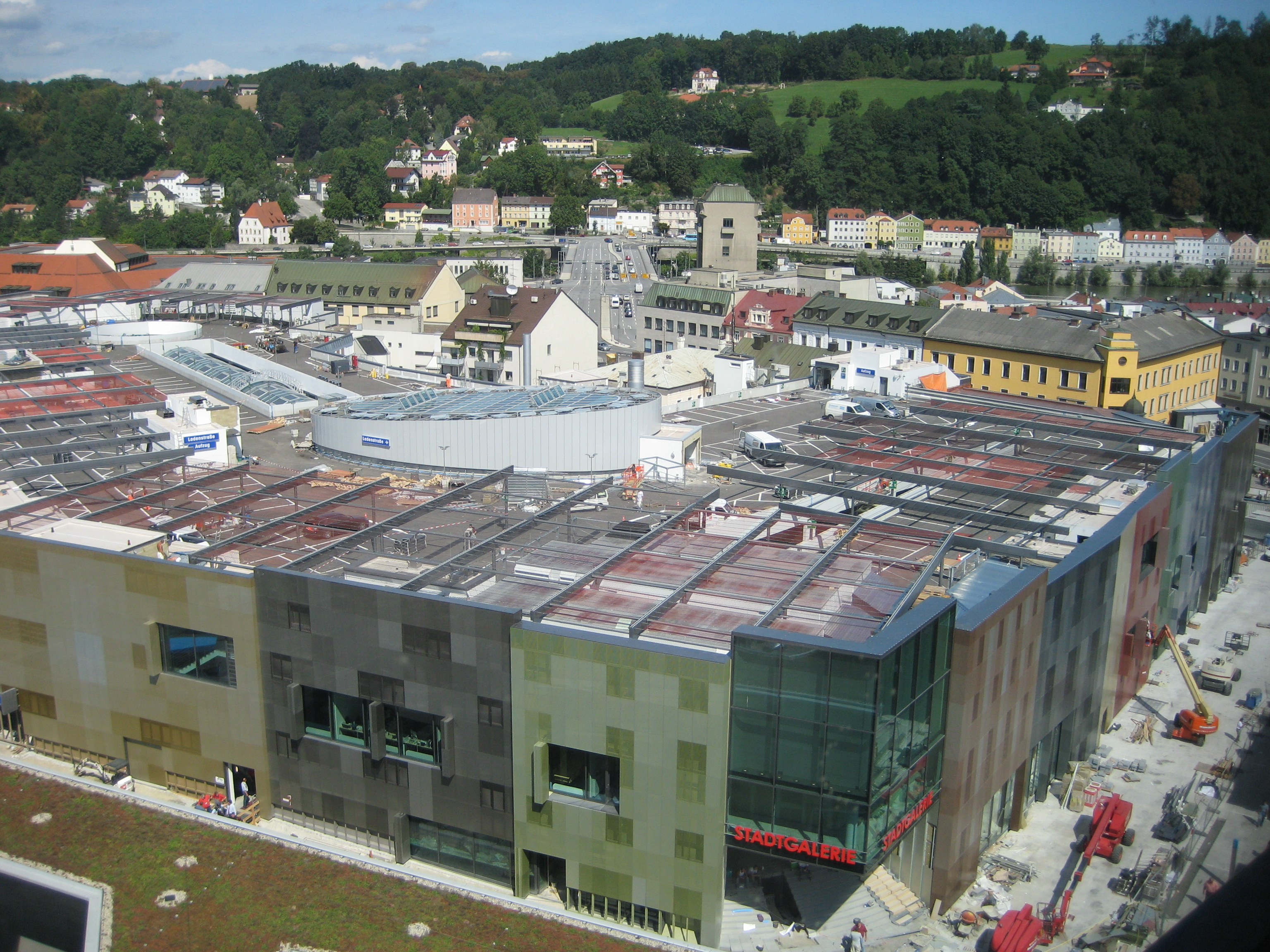 Baustelle der Stadtgalerie, Neue Mitte Passau, August 2008